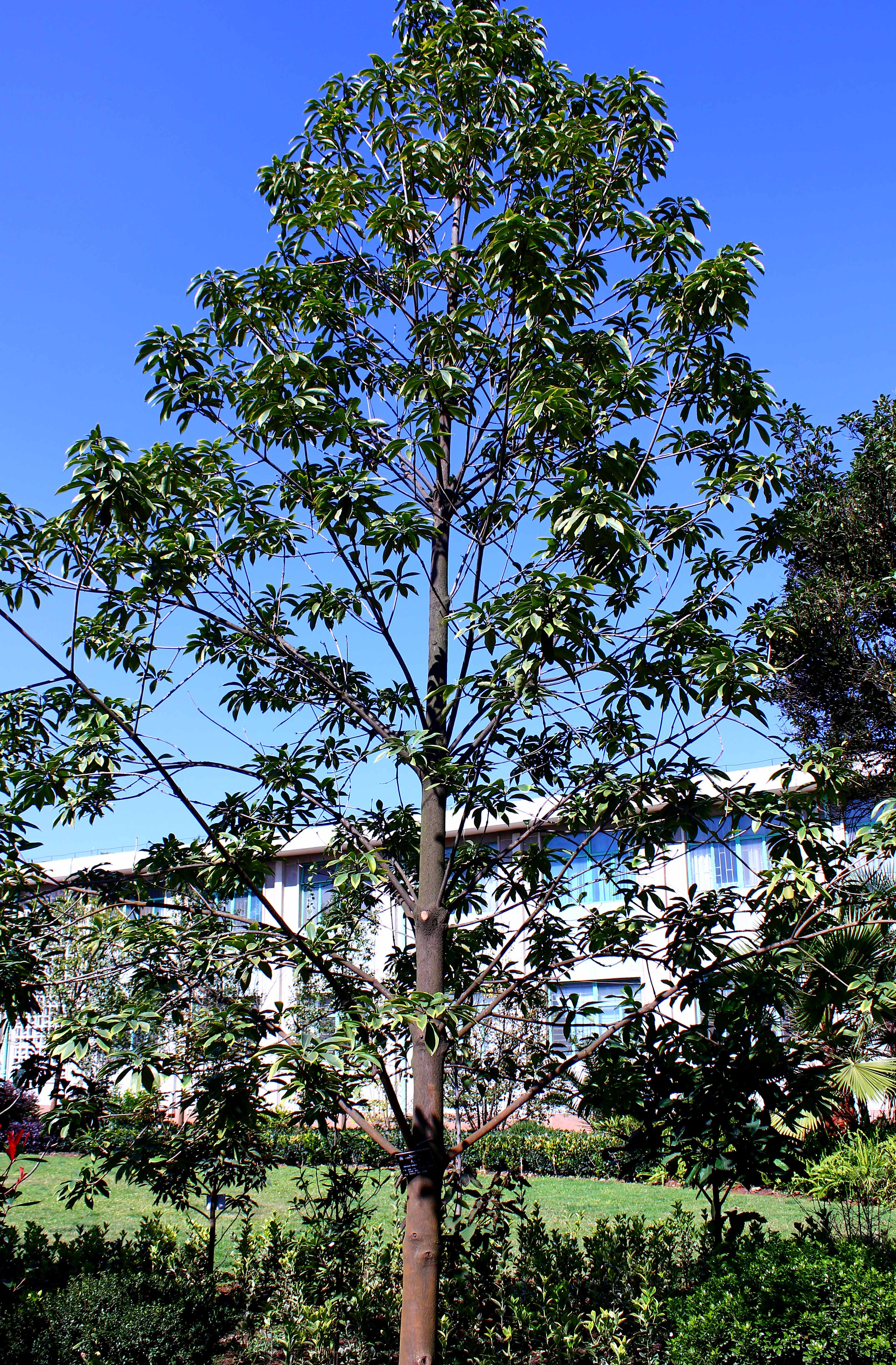 大八角（Illicium majus），拍摄于昆明植物园。